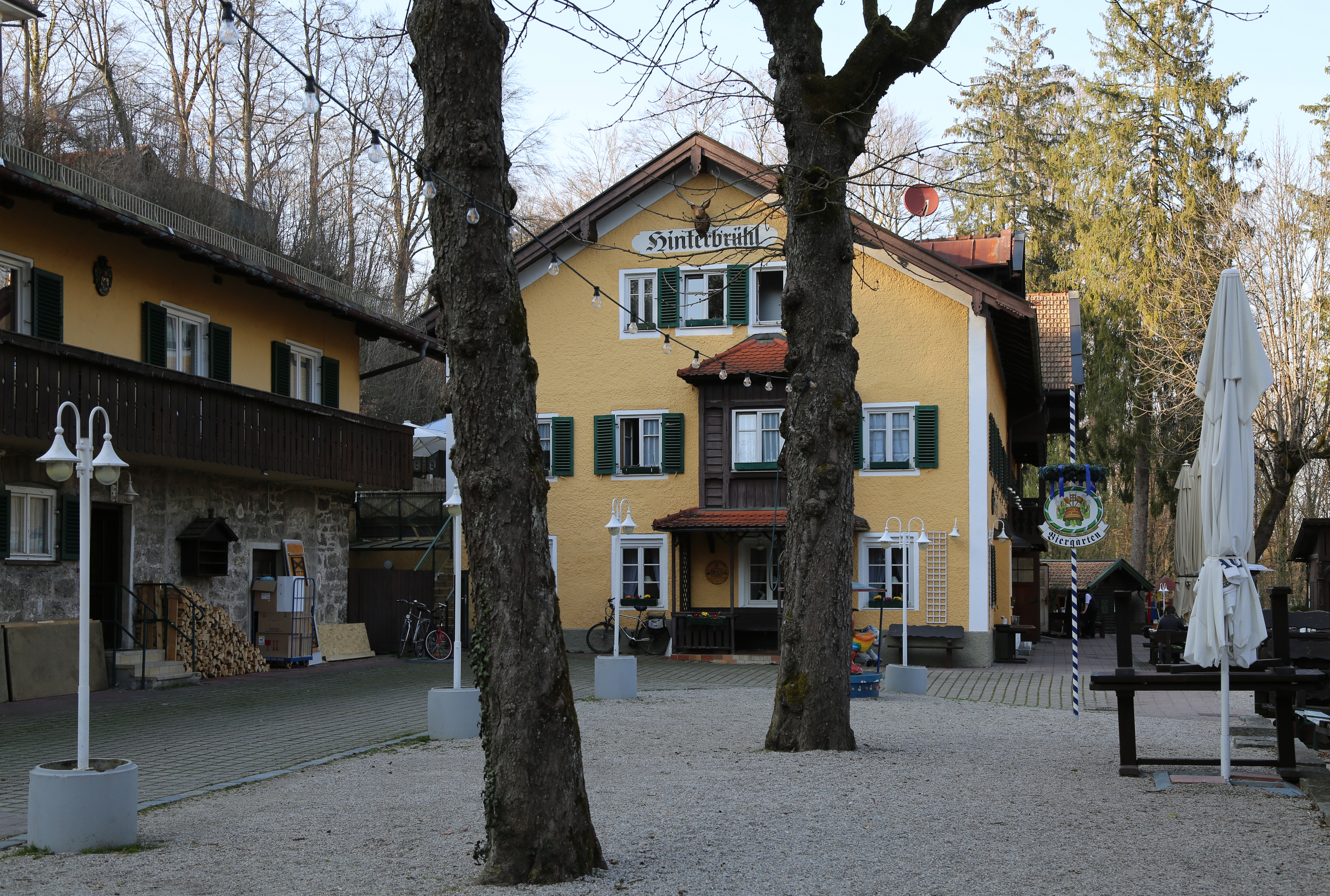 Gasthof Hinterbrühl, im Münchner Stadtteil Thalkirchen